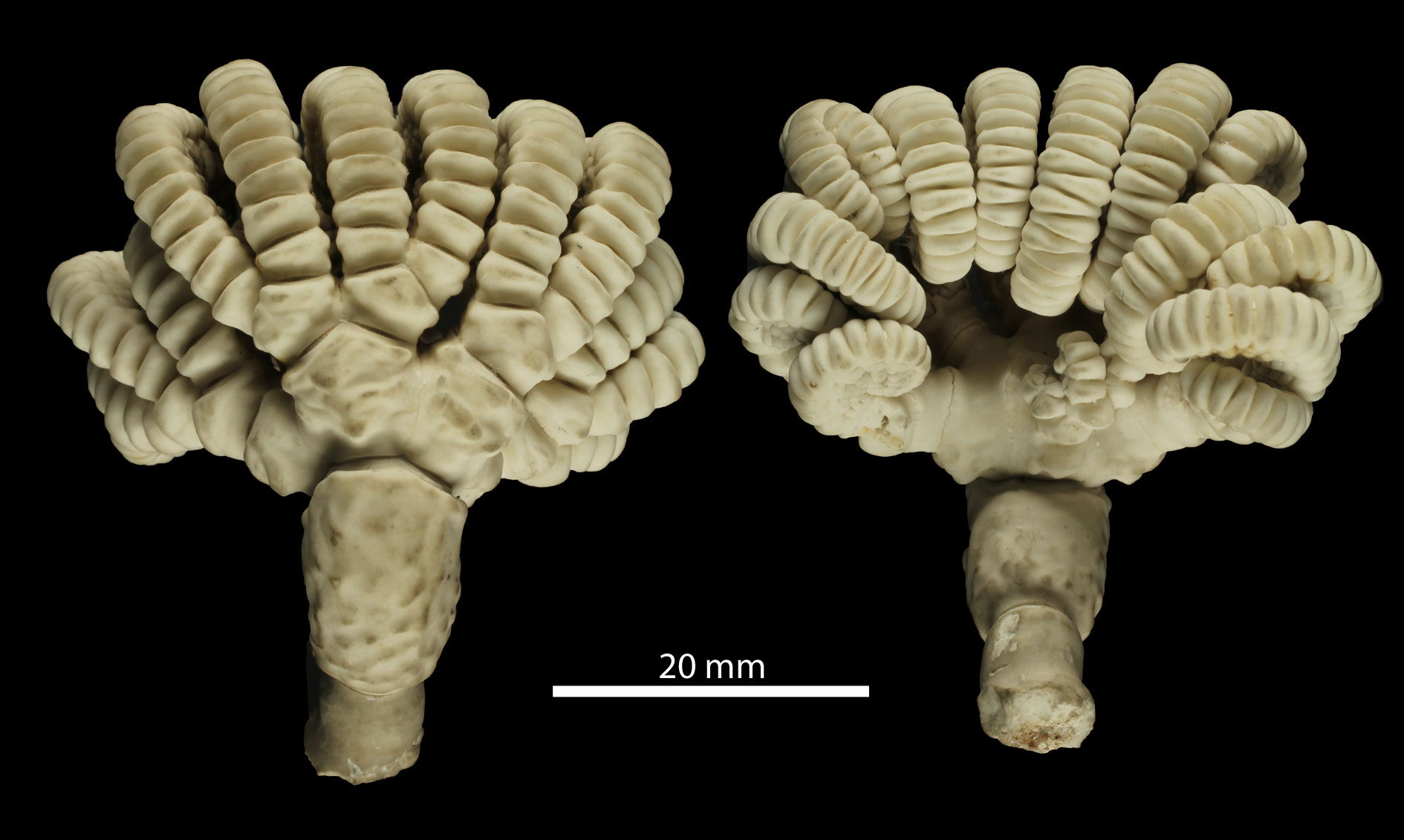 Neogymnocrinus richeriSpécimen MNHN-IE-2013-10051, sous la dénomination Gymnocrinus richeri Bourseau, Améziane-Cominardi & Roux, 1987Collection : Échinodermes (IE)Muséum National d'Histoire Naturelle (Paris, France). Origine : Libellé du pays : NOUVELLE-CALEDONIE Localité/Lieu-dit : Ride de Norfolk Localité originale : Mont Stylaster Nom du collecteur : Bouchet, Métivier & Richer de Forges-IRD coll. Océan : Pacifique sud Expédition : CHALCAL 2 Navire : Coriolis Type : Navire océanographique Numéro de station : DW76 Date de récolte : 1986-10-30T07:18+0100 Profondeur (mètres) : 470 Coordonnées géographiques : 23° 40' 29.9964 S 167° 45' 11.9736 E